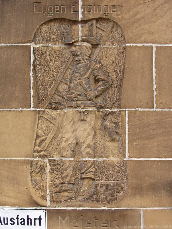 Detail am Wohnhaus in der Uhlandstr. 67 in Heilbronn